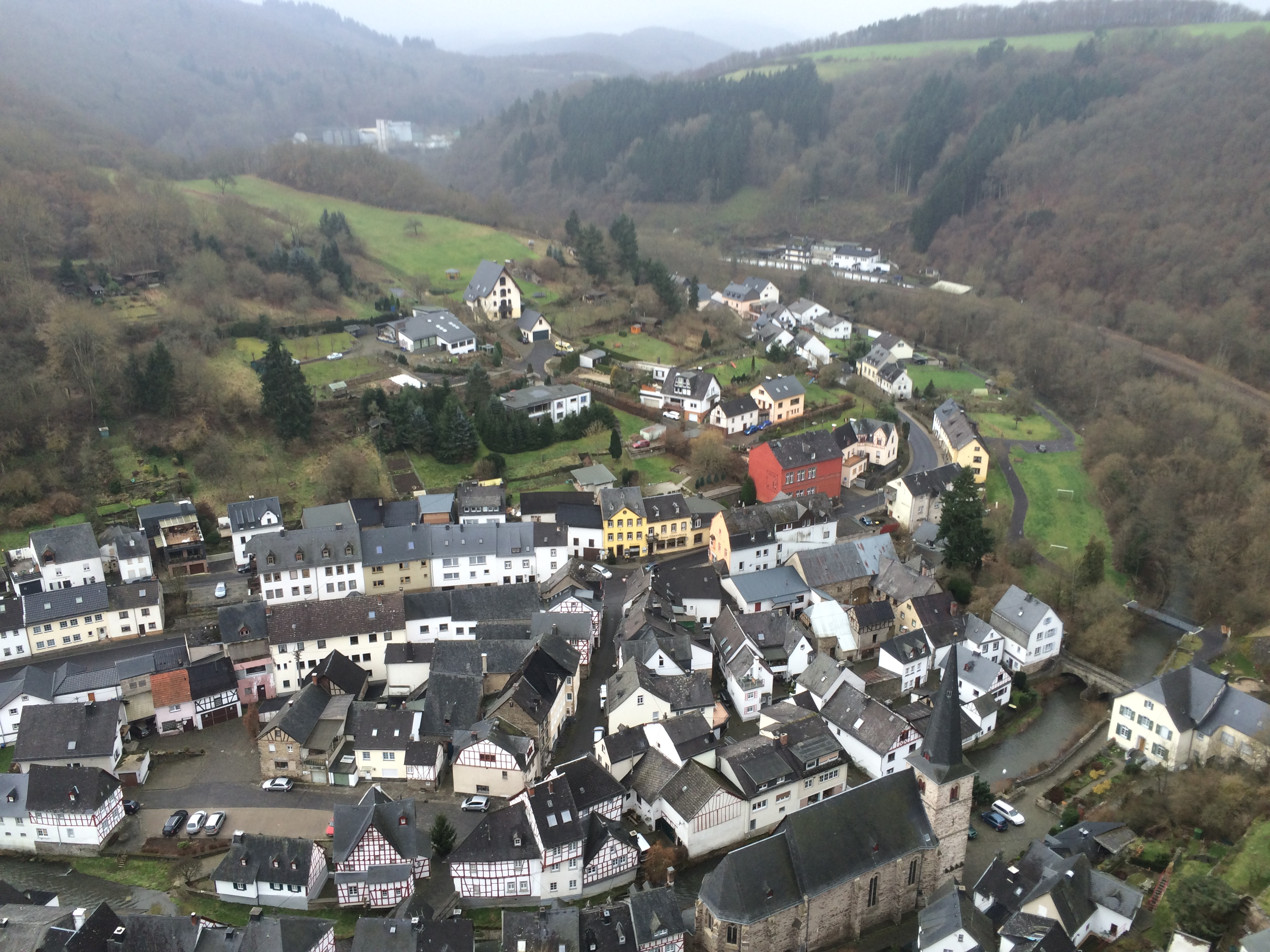 Blick über Monreal (2014).